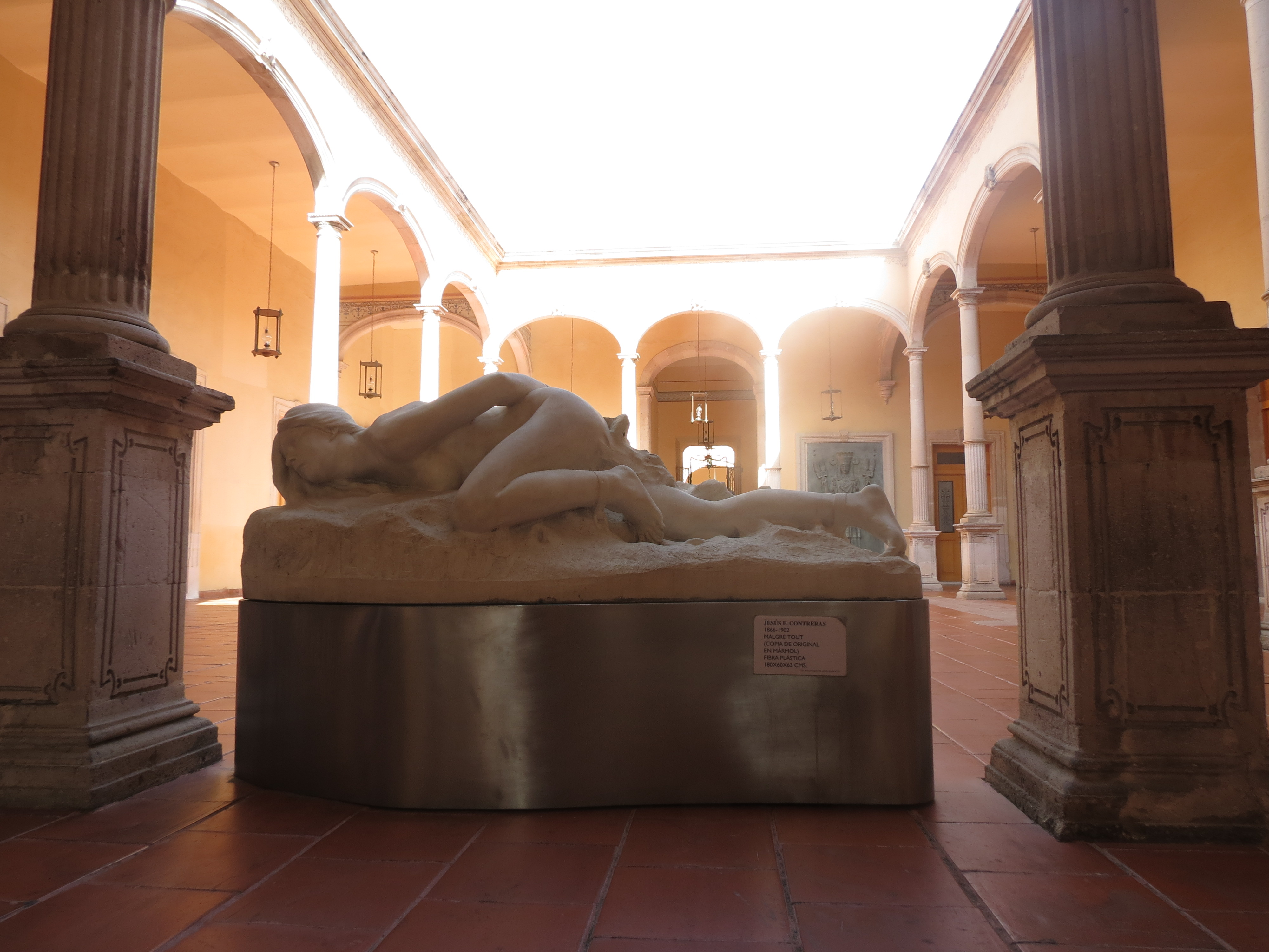 Réplicas del 'Malgre Tout' de Contreras en el Museo Aguascalientes